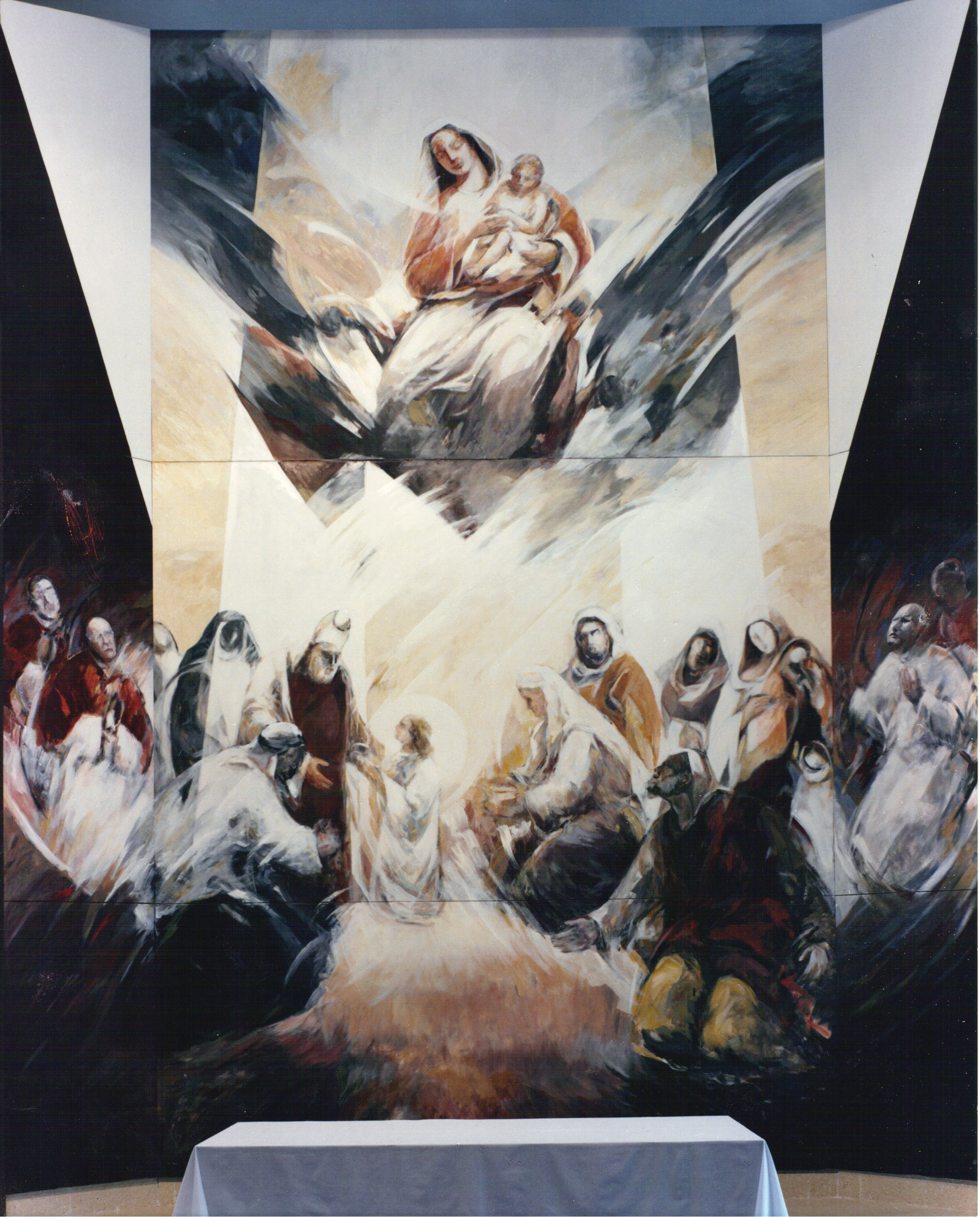 Ruizanglada - Iglesia Parroquial de La Presentación de Zaragoza